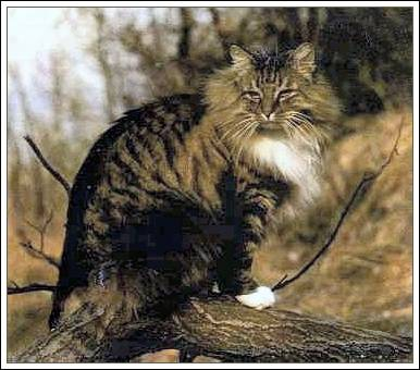 Gato Modelo de la raza Bosque de Noruega